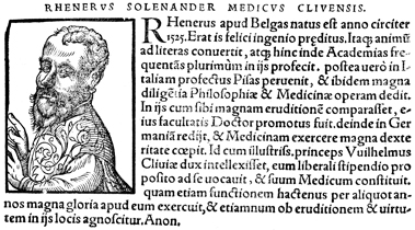 Bildnis von Reiner Solenander aus einem Buch von Heinrich Pantaleon (* 13. Juli 1522 in Basel; † 3. März 1595 ebenda)